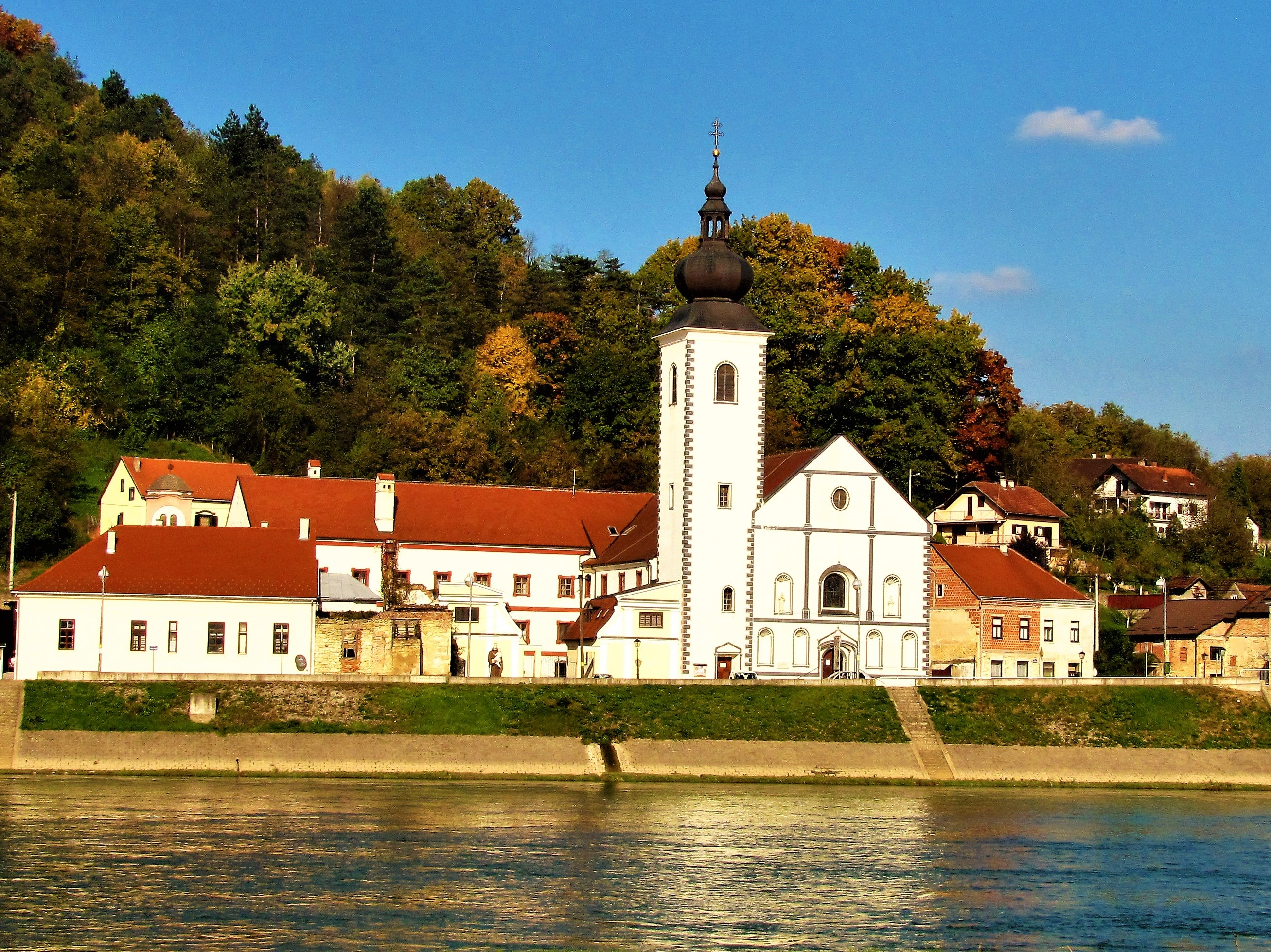 Crkva i samostan sv. Antuna Padovanskog